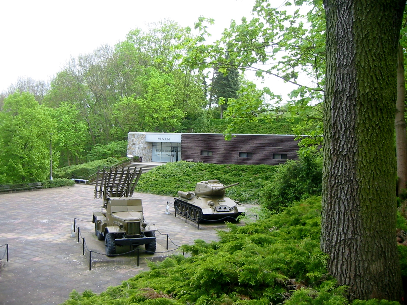 Vorplatz der Gedenkstätte mit Geschosswerfer BM-13-16 NM und T-34-Panzer, im Hintergrund die Gedenkstätte Die Gedenkstätte Seelower Höhen erinnert in der brandenburgischen Kreisstadt Seelow (Landkreis Märkisch-Oderland) an die Schlacht um die Seelower Höhen im Jahr 1945.